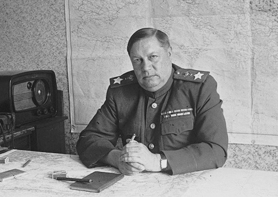 Командующий 3-м Украинским фронтом Маршал Советского Союза Ф.И. Толбухин, 1944